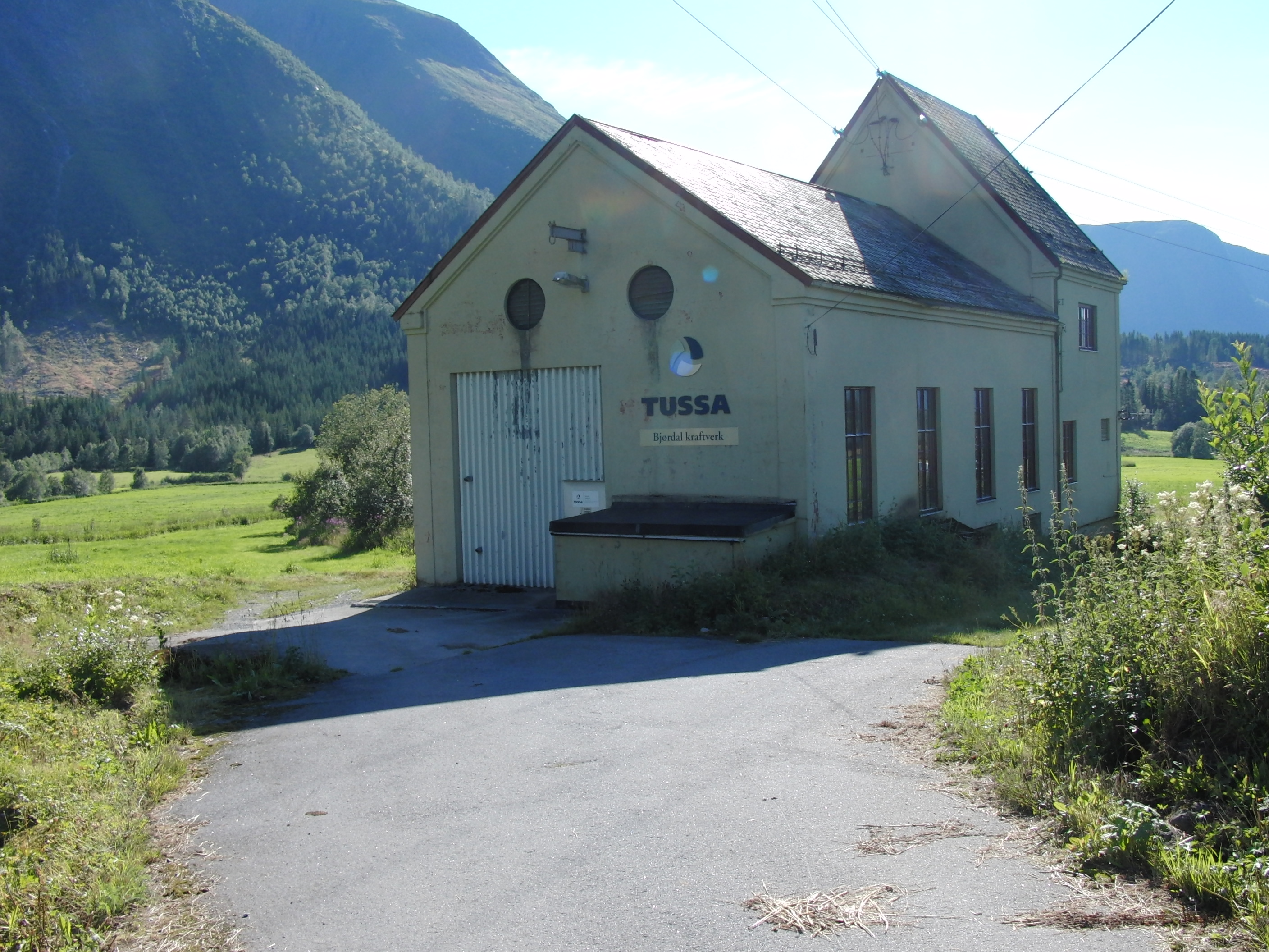 Bjørdal kraftverk